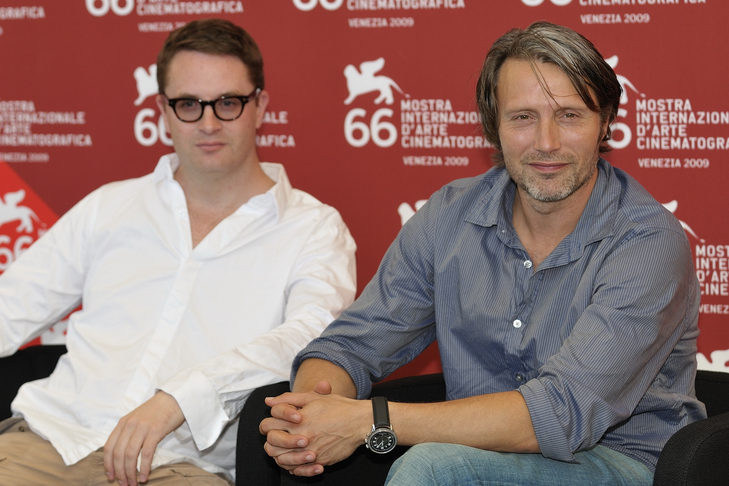 66ème Festival du Cinéma de Venise (Mostra), 3ème jour (04/09/2009) PhotoCall avec Mads Mikkelsen, Nicolas Winding Refn (Réalisateur) pour le film : Valhalla Rising